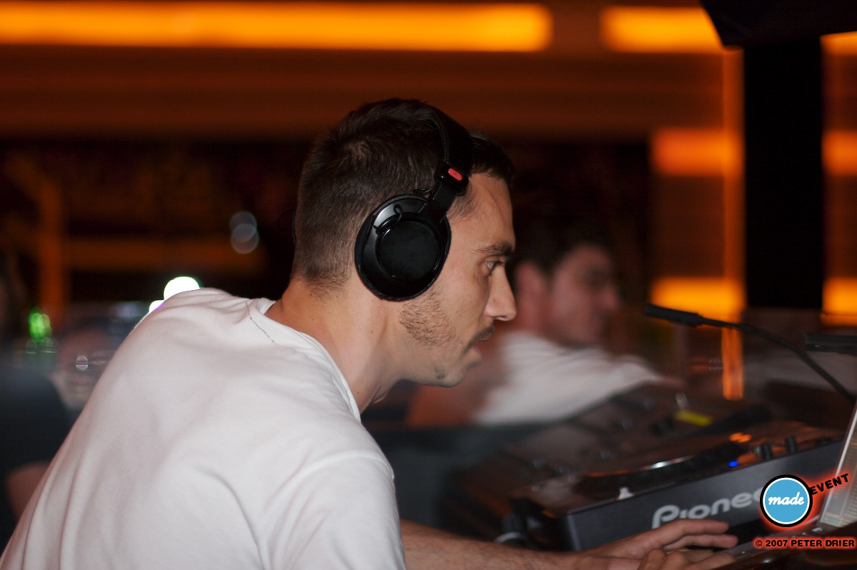 Steve Bug